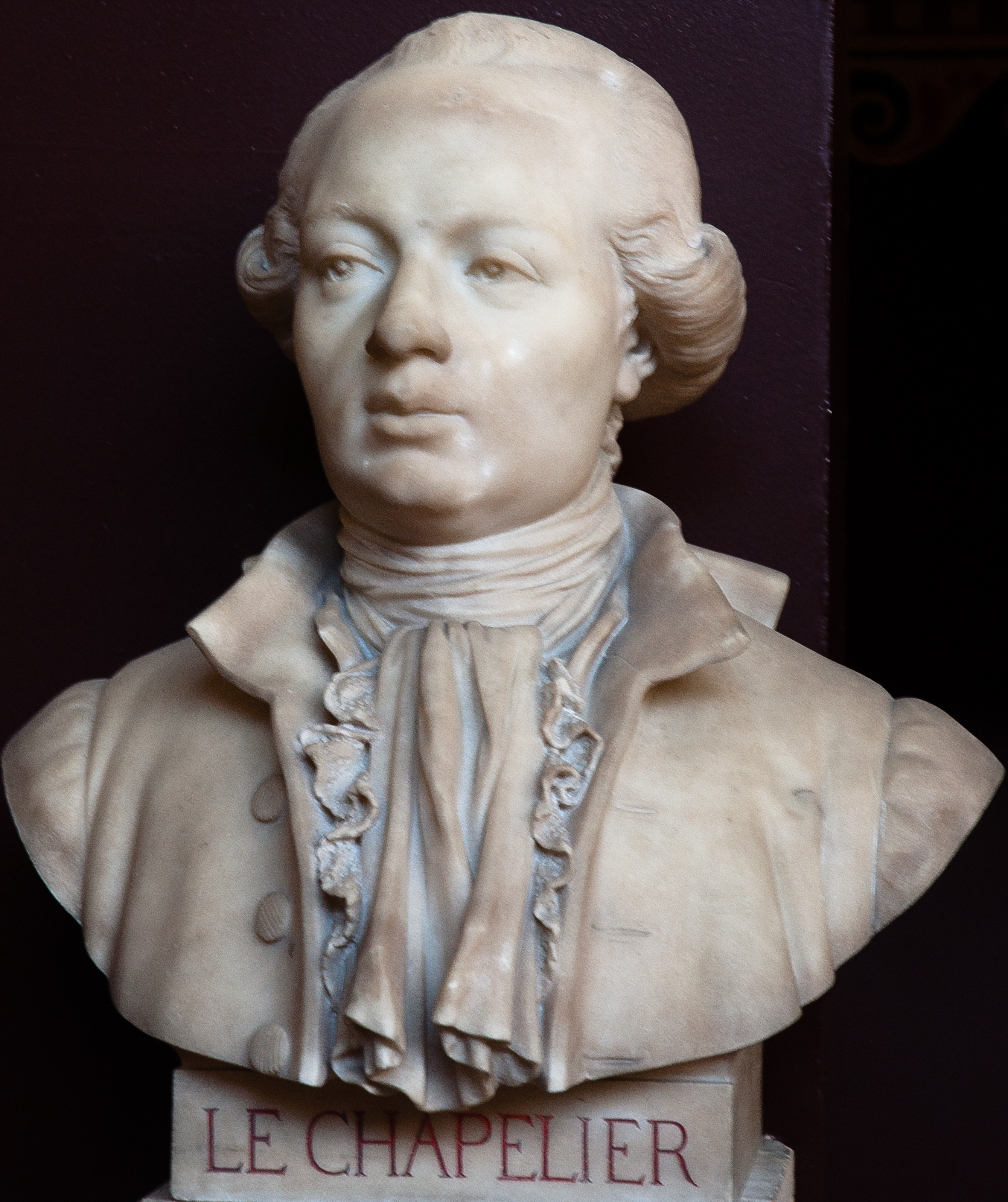 Buste de Isaac-René-Guy Le Chapelier -- Salle du serment du jeu de paume -- Versailles